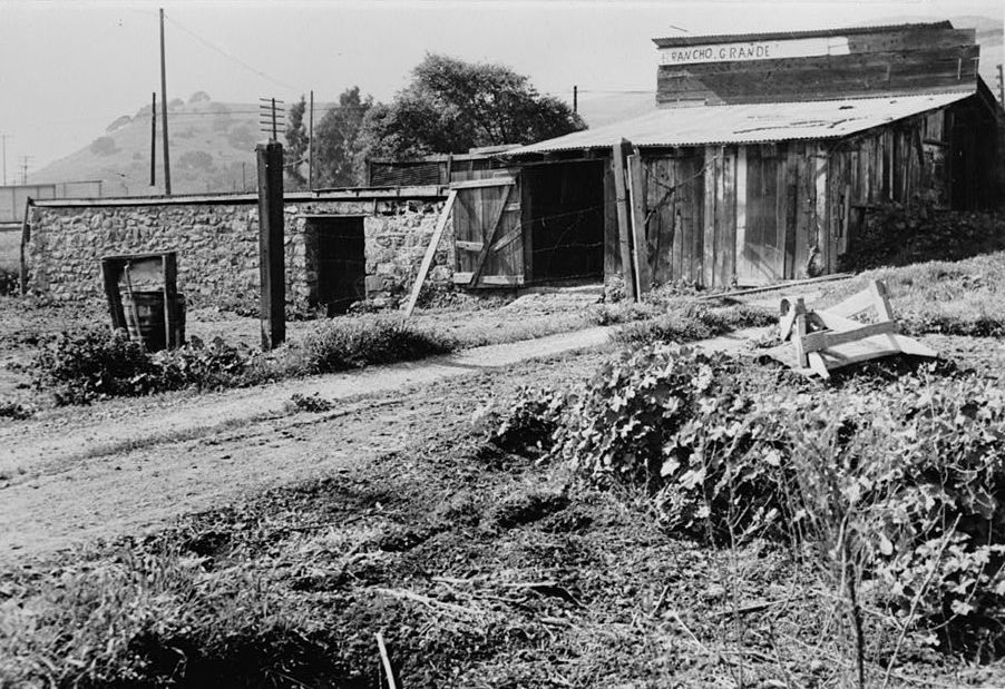 Vallejo Flour Mill, Fremont California, USA